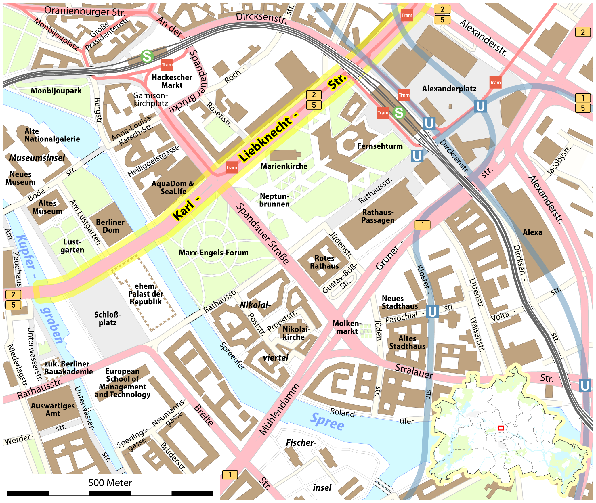 Karte des Südteils der Karl-Liebknecht-Straße in Berlin This map may be incomplete, and may contain errors. Don't rely solely on it for navigation.